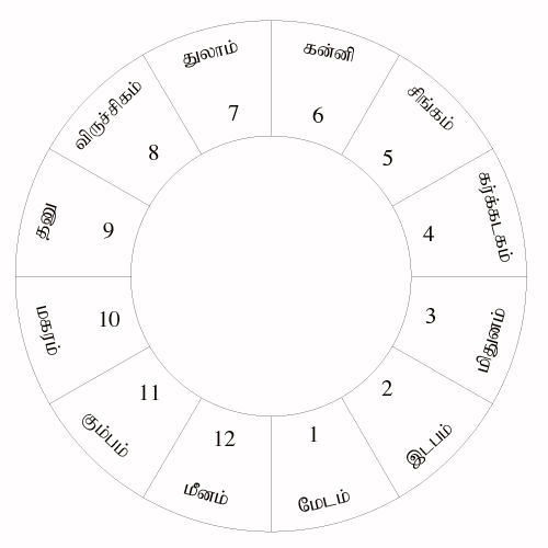 பகுப்பு:தமிழில் விளக்க வரைபடங்கள்